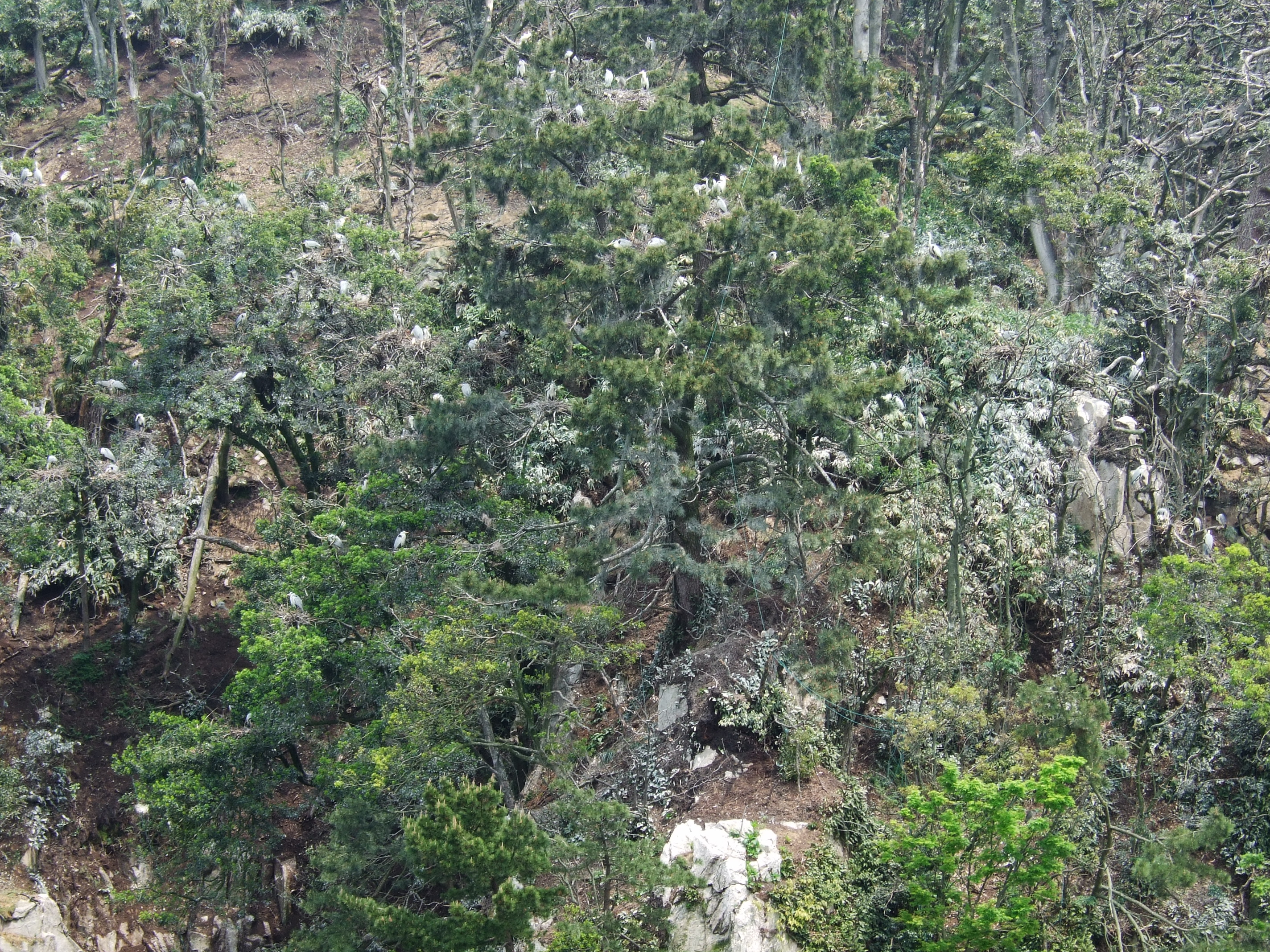 竹生島